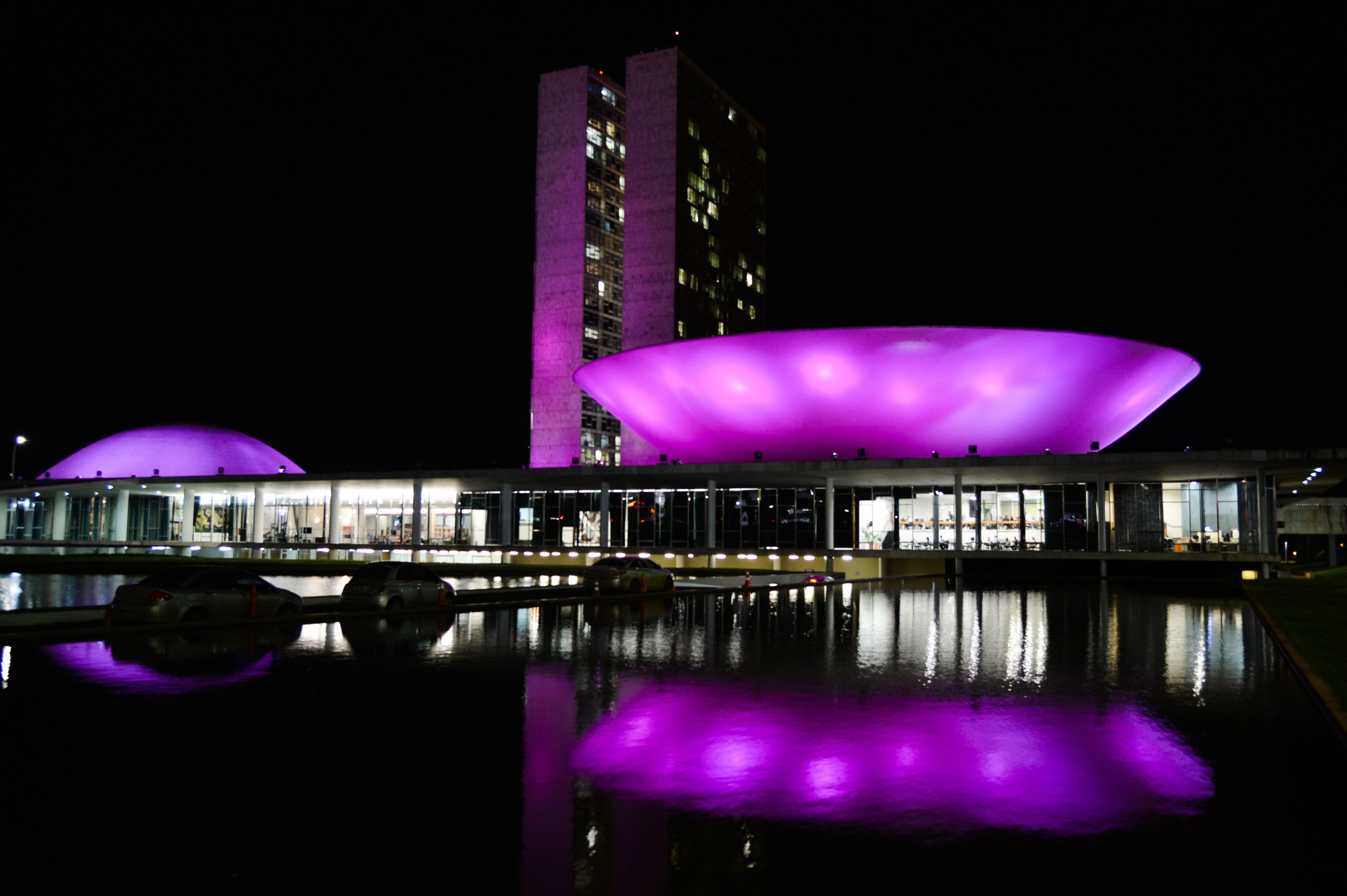 Congresso Nacional do Brasil com iluminação especial na cor roxa para celebrar o Purple Day - Dia Mundial da Conscientização da Epilepsia.